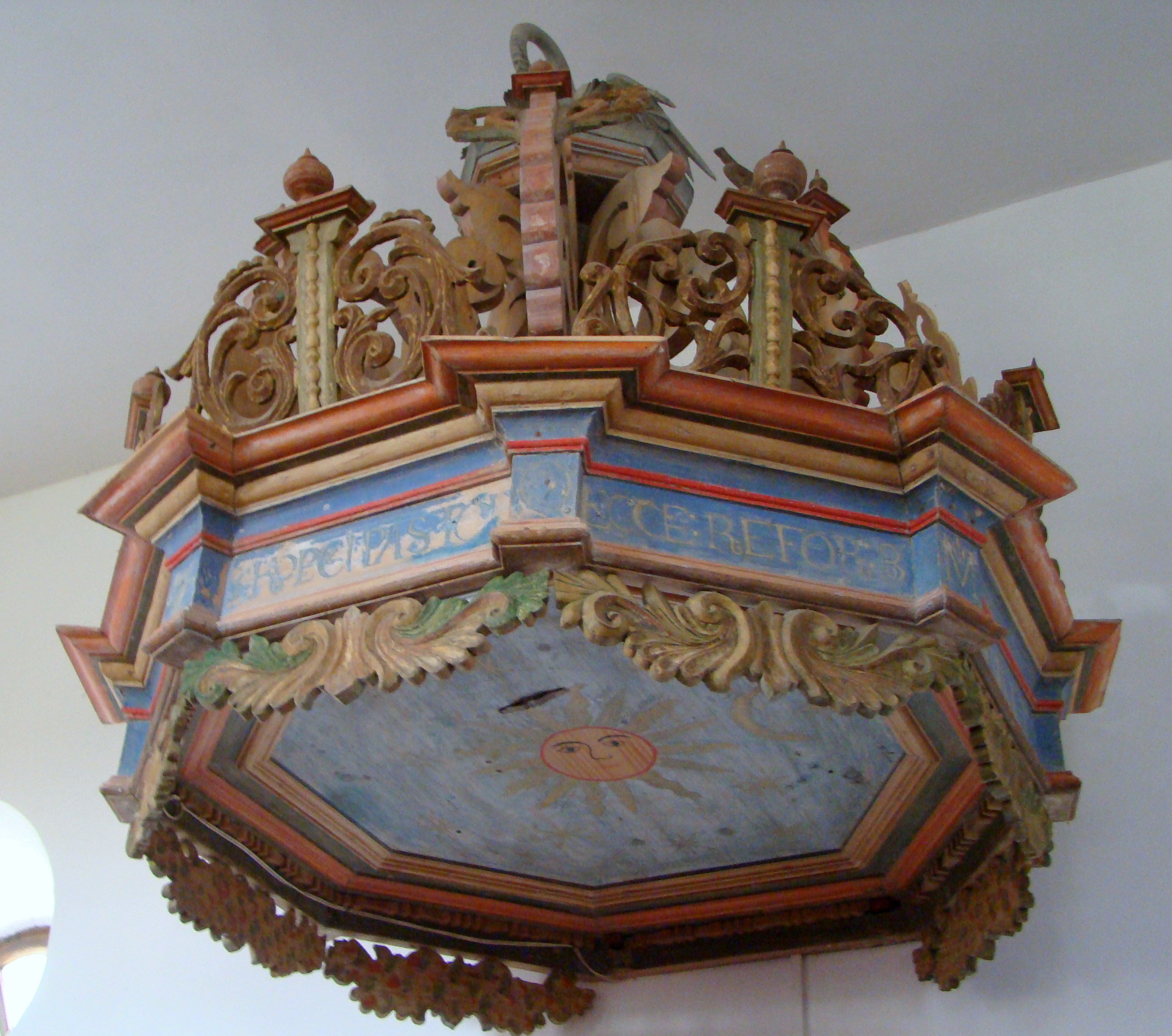 Biserica reformată, sat Belin; comuna Belin 612 1770 (biserica), 1911 (turn)